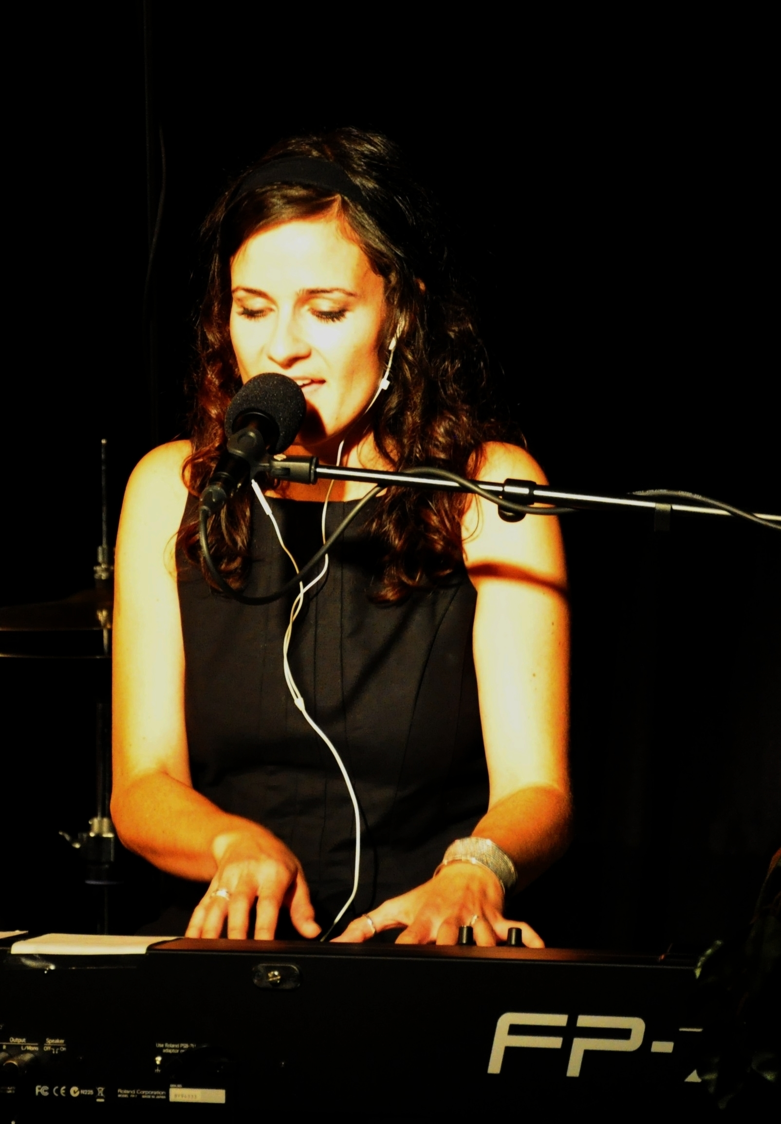 Julie Weißbach bei einem Konzert im Fools Garden Theater in Hamburg (31.08.2013)